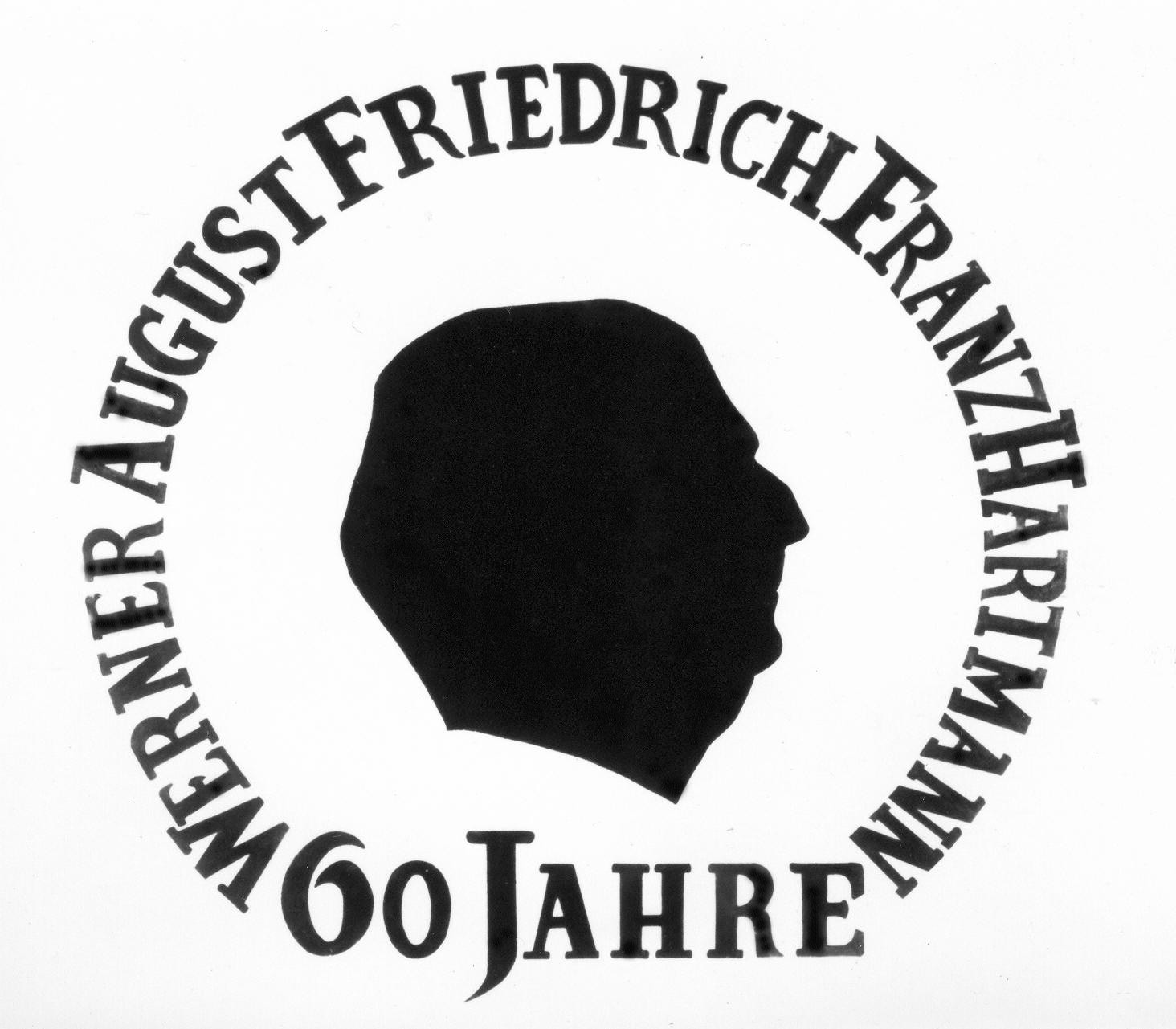 Scherenschnittporträt von Prof. Dr.-Ing. Werner Hartmann, ihm gewidmet anläßlich seines 60. Geburtstages